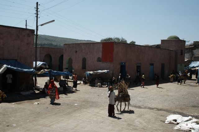 Harar